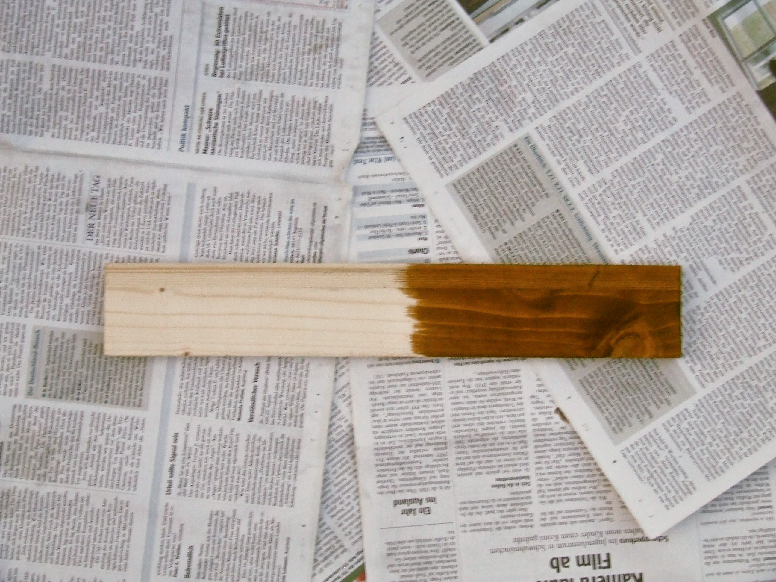 Fichtenholz, die rechte Haelfte gebeizt in "Eiche mittel".